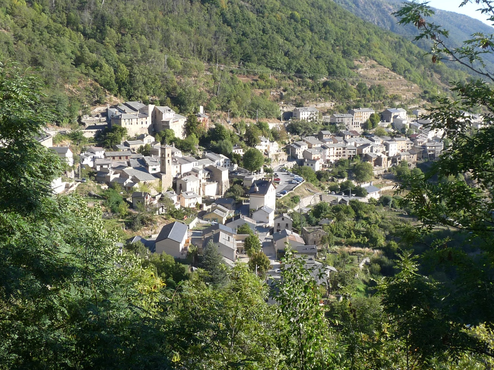 Fontpédrouse , Pyrénées-Orientales, France